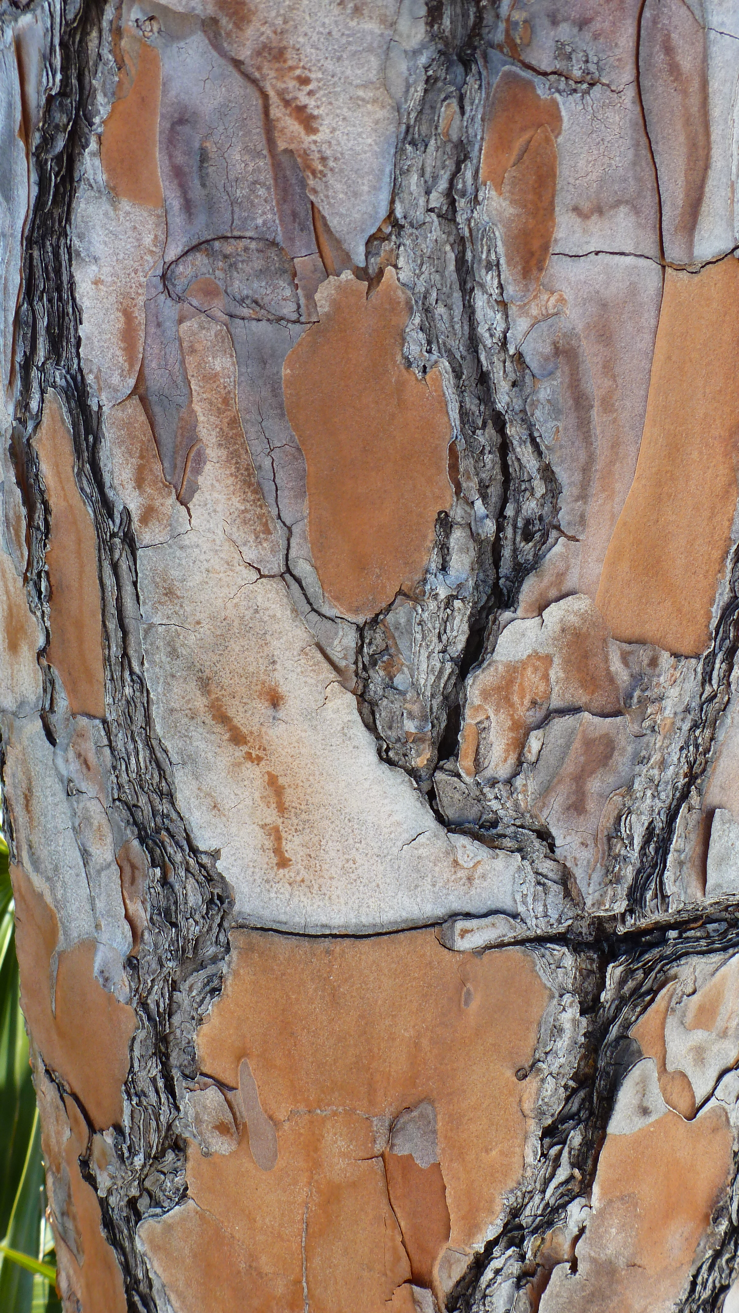 Pinus caribaea var. bahamensis bark, Lucayan National Park, Bahamas